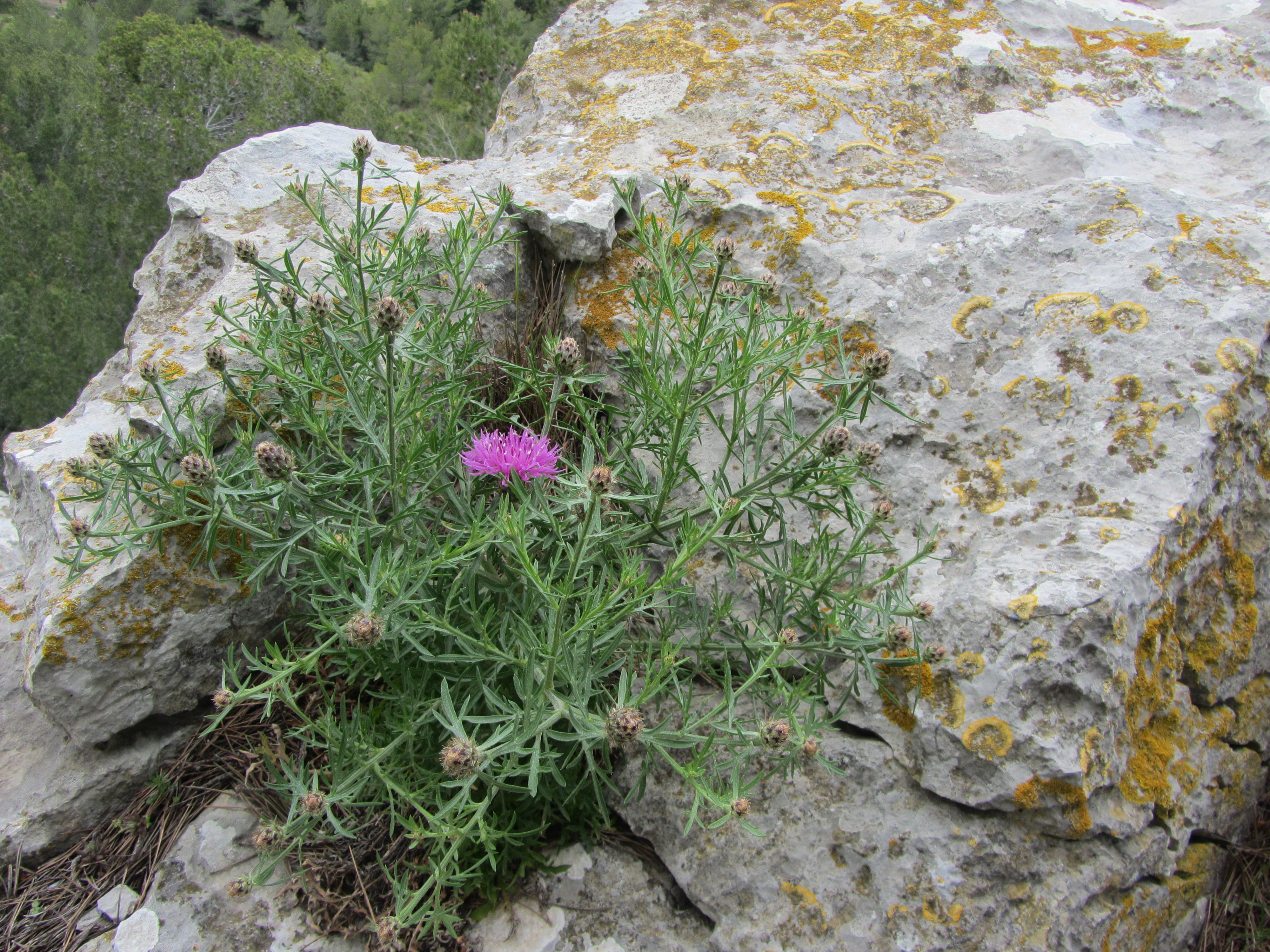 Centaurea corymbosa GRUISSAN AUDE